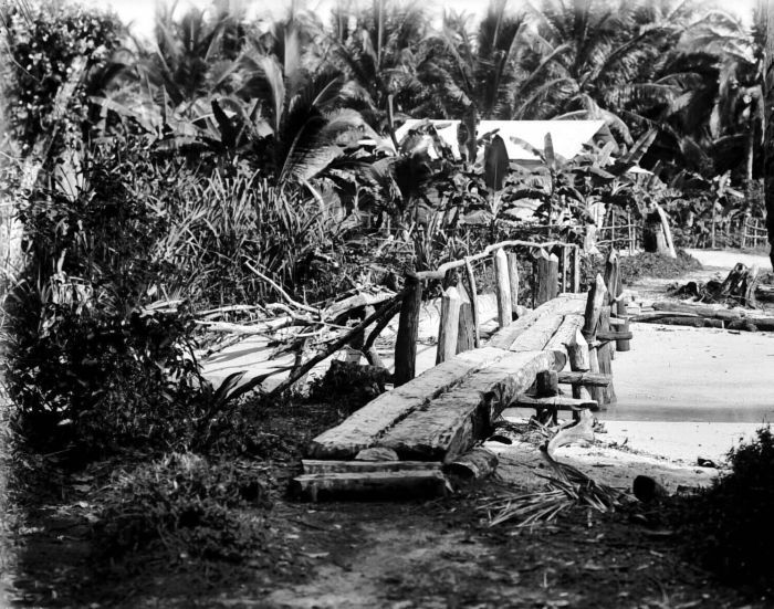 Negatief. Twee mannen bekijken malaria-haarden aan de kust van het hoofdeiland van Enggano, Benkoelen, Sumatra